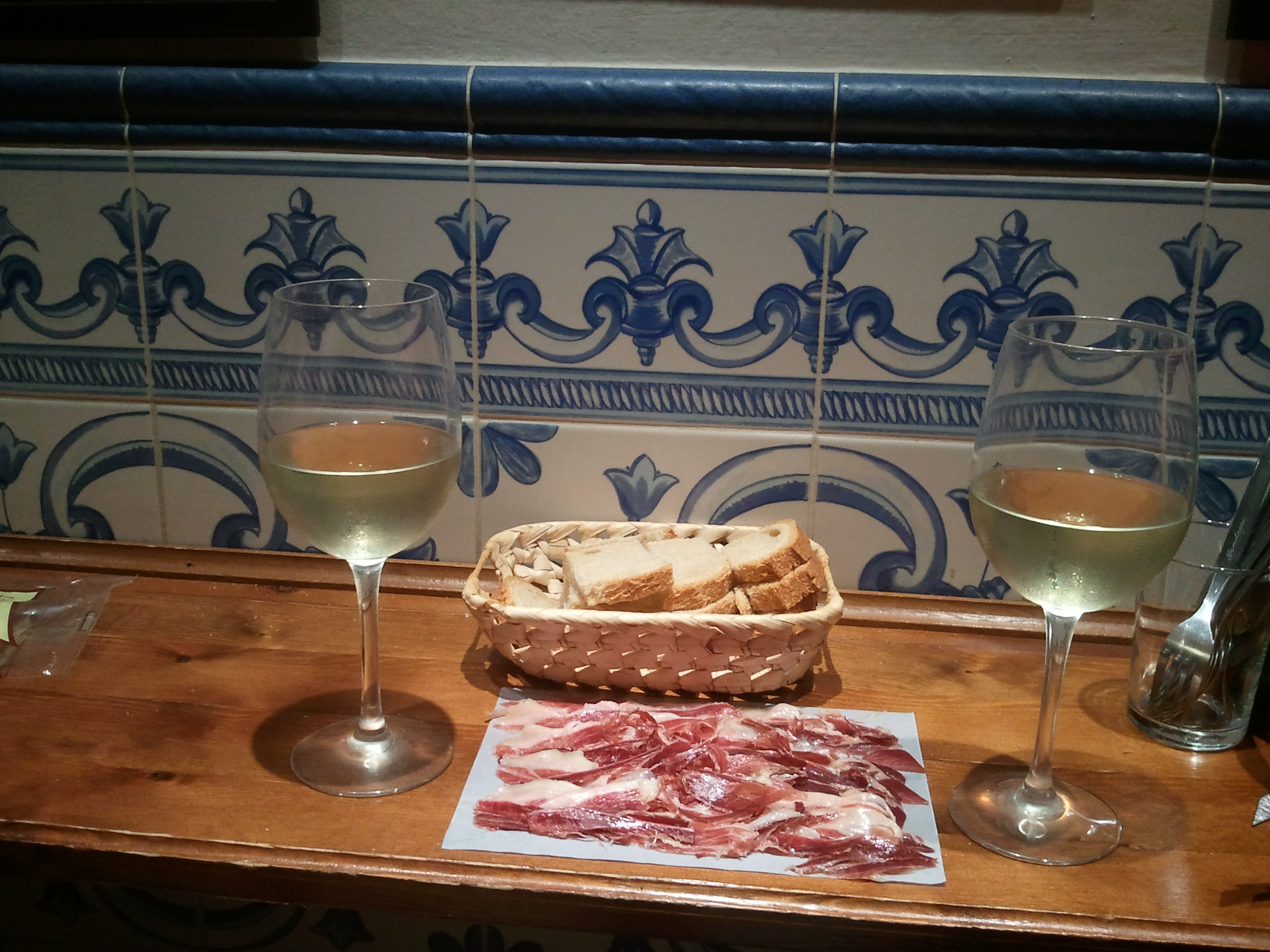 Tapa de jamón con un vino blanco de Rueda, Taberna Casa Curro, Marbella, España.